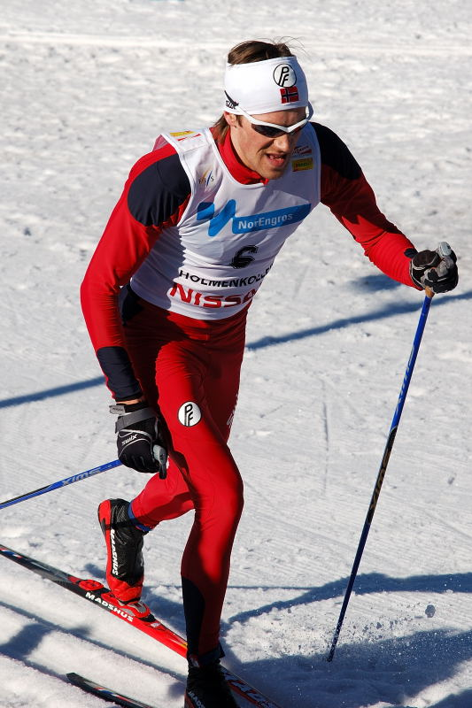 Oslo, Norway 2007